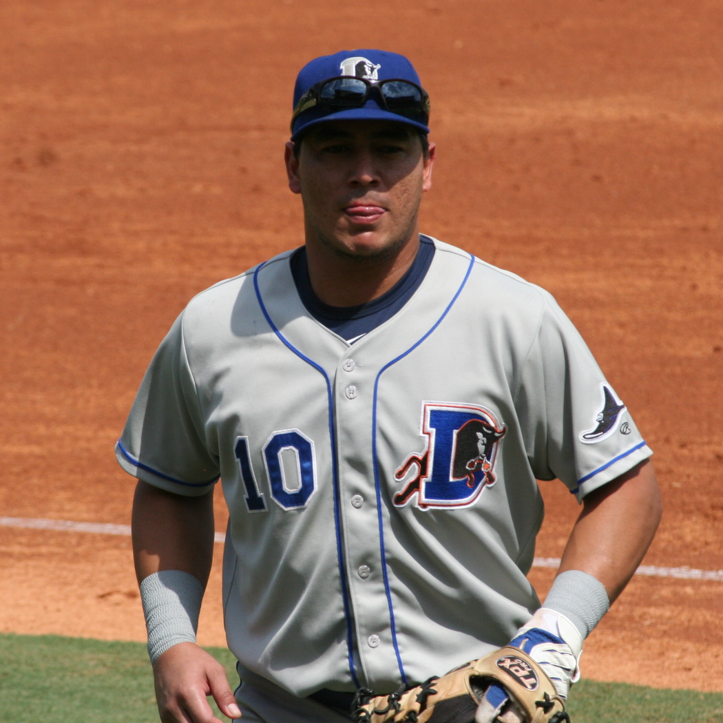 Ángel Chávez